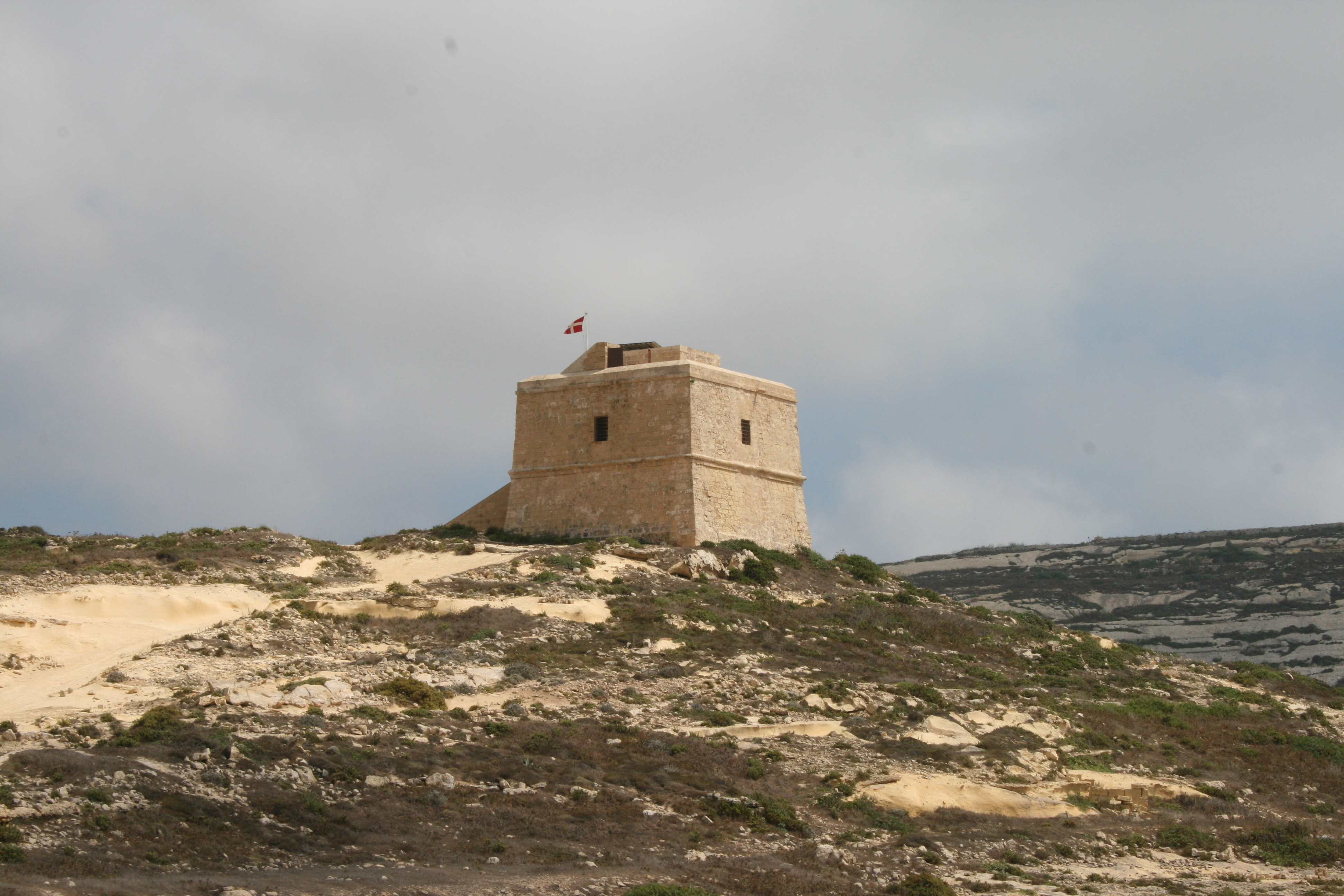 Dwejra Tower auf Gozo